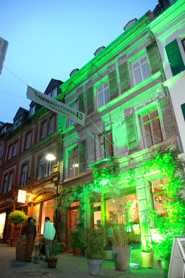 Aufnahme des kuenstlerhaus 43 in der Oberen Webergasse 43, Wiesbaden (Deutschland).